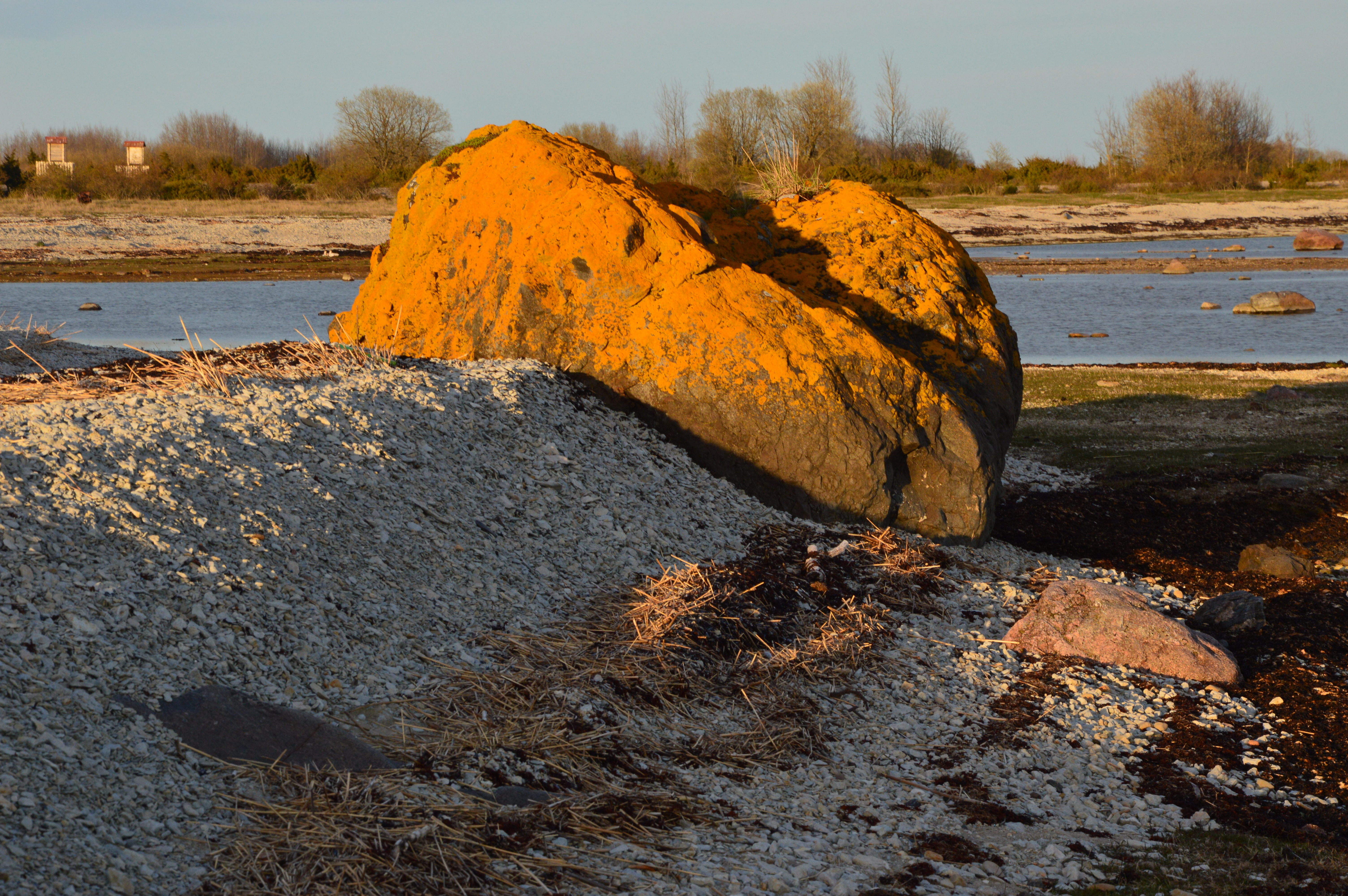 Osmussaare I rahnuderühm